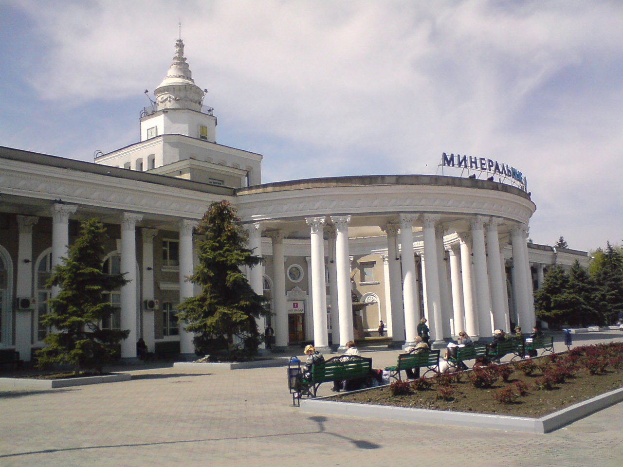 Вид с первой платформы